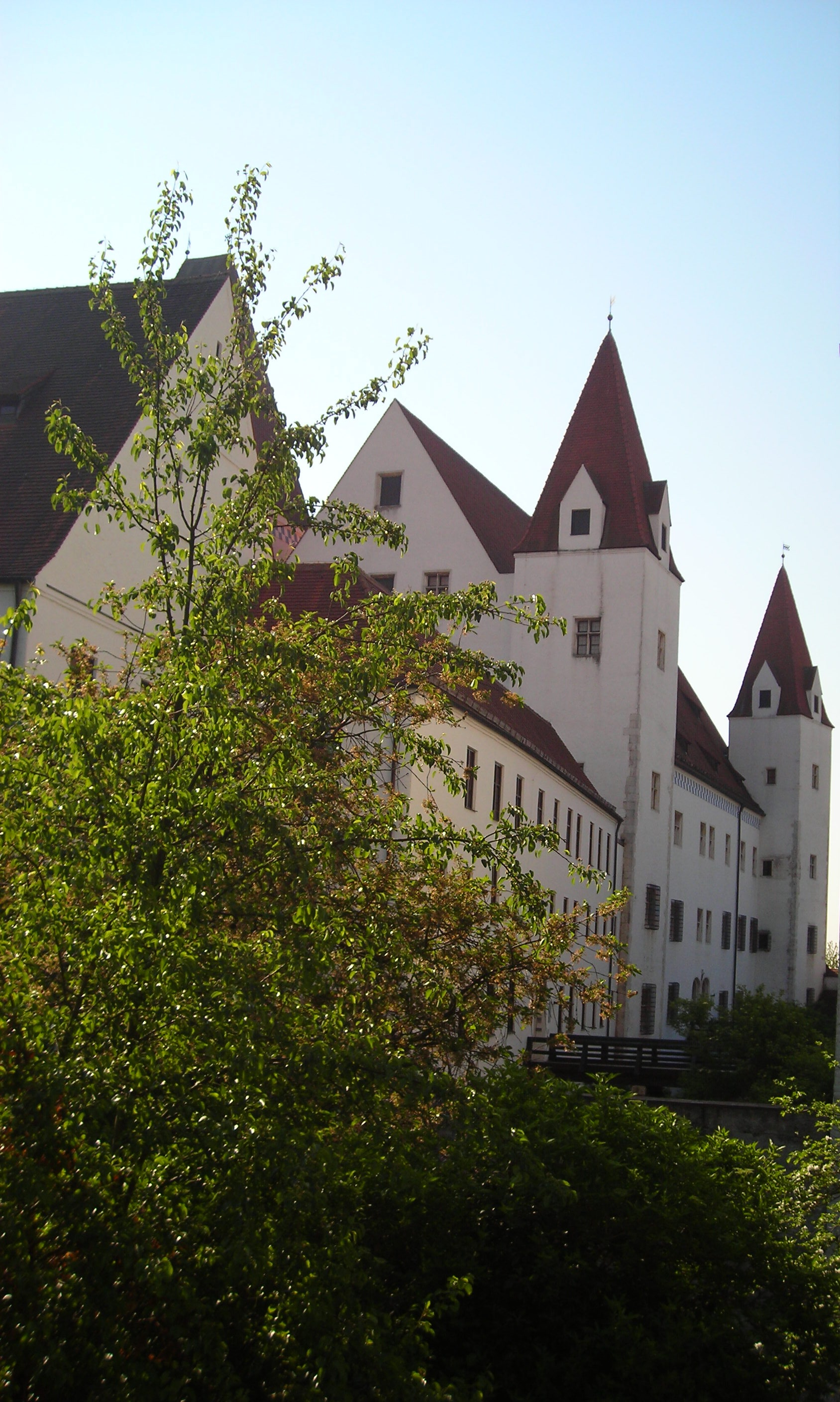 Neues Schloss Ingolstadt